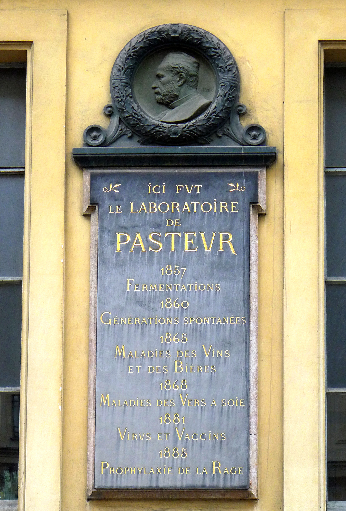 Rue d'Ulm (plaque commémorative des travaux de Louis Pasteur réalisés dans son laboratoire de l'école normale supérieure) - Paris V